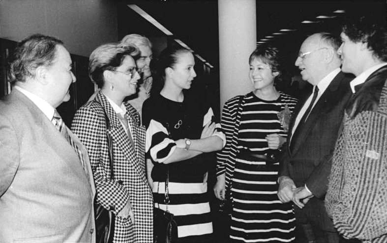 Berlin, Kongress der Unterhaltungskunst ADN-ZB Senft 1.3.89 Berlin: Kongreß der Unterhaltungskunst der DDR In einer Beratungspause des ersten Tages unterhielten sich Michael Hansen, Schlagersänger, Kurt Hager, Mitglied des Politbüros und Sekretär des ZK der SED, Barbara Kellerbauer, Chansonsängerin, Ines Paulke, Rocksängerin, Dagmar Frederic, Sängerin und Moderatorin und Heinz Quermann, Conferencier, v.r. Im Hintergrund: Der geschiedene Ehemann von Dagmar Frederic, Schlagersänger Peter Wieland. Abgebildete Personen: Frederic, Dagmar: Schlagersängerin, DDR (GND 119269511) Hager, Kurt: Mitglied des Politbüros des ZK der SED, Staatsratsmitglied, DDR (GND 119385511) Hansen, Michael: Schlagersänger, DDR (GND 134397576) Kellerbauer, Barbara: Sängerin, DDR (GND 134669258) Paulke, Ines: Sängerin, DDR (GND 134584376) Quermann, Heinz: Conferencier, Liberal-Demokratische Partei Deutschlands (LDPD), DDR (GND 119063824) Wieland, Peter: Schlagersänger, DDR